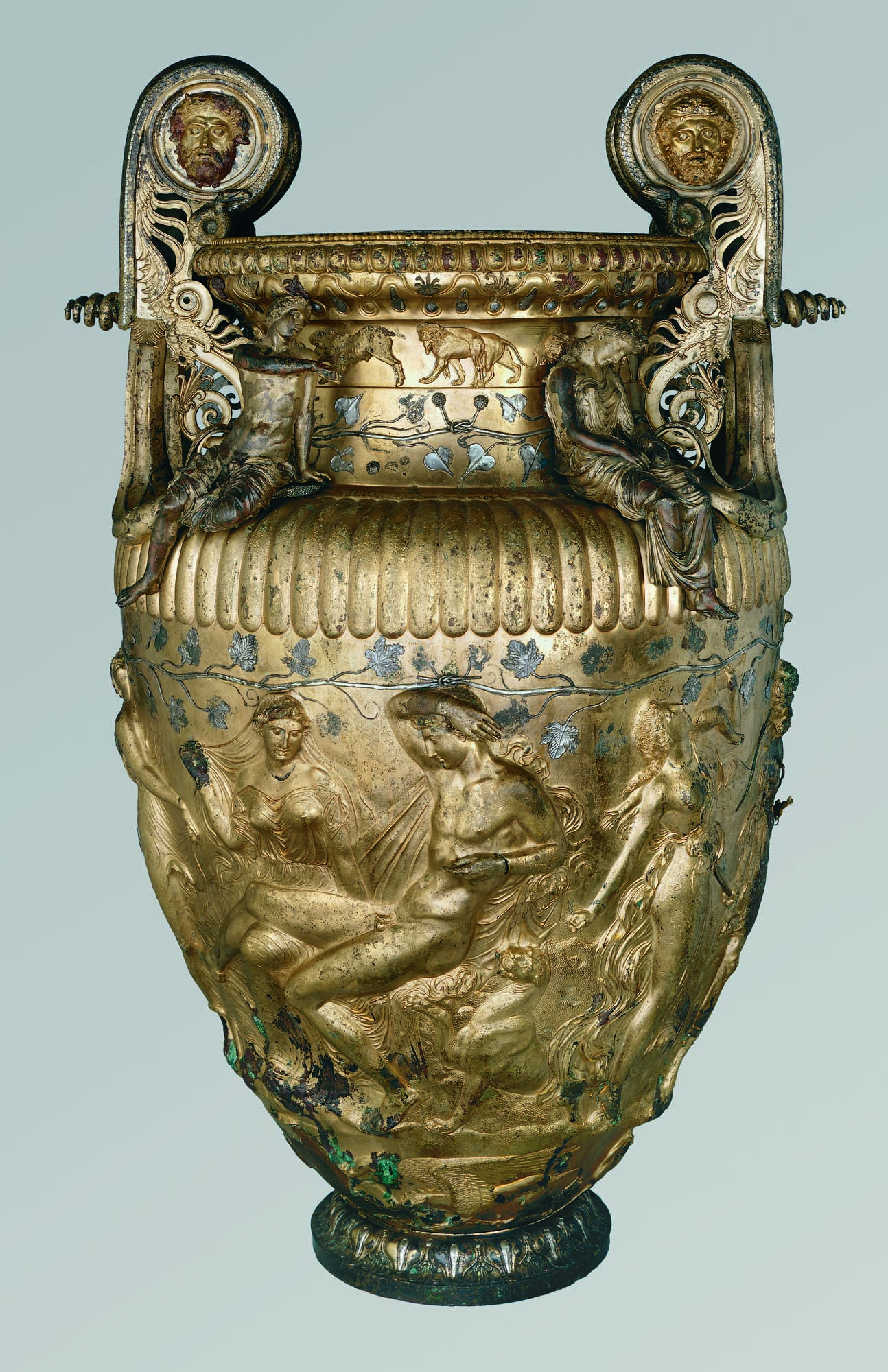 Fig. 1. Derveni krater, side A